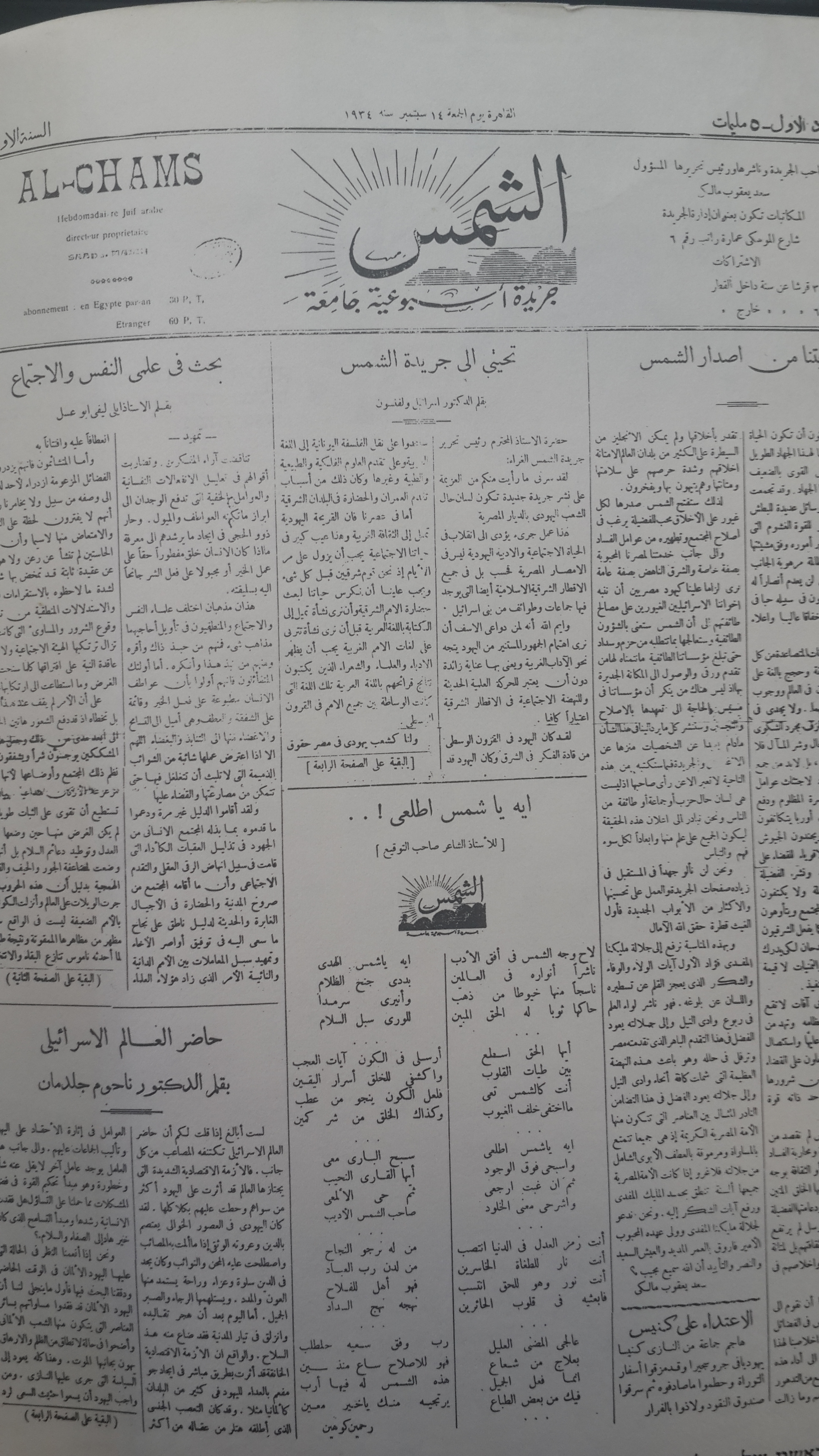 עמוד השער של גליונו הראשון של העיתון אל- שמס